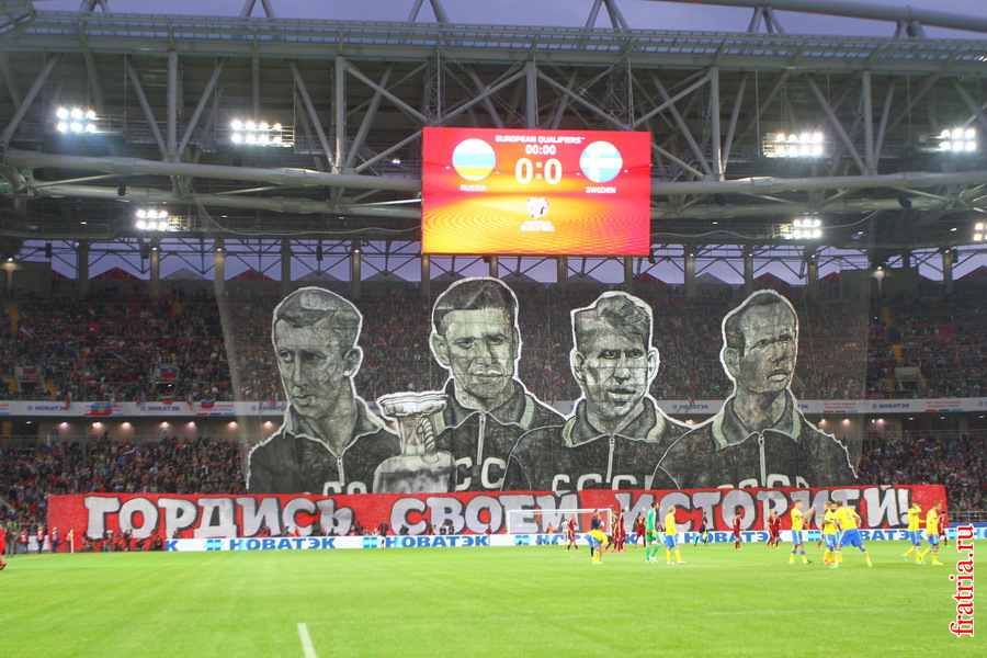 Перформанс "Гордись своей историей!". Матч Россия - Швеция. Отборочный матч к ЕВРО-2016